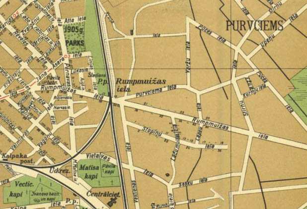 Rumpmuižas iela 1933. gada Rīgas kartē